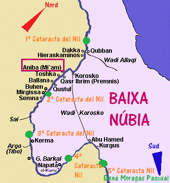 El mapa mostra a Aniba, l'antic Miam. Crat per Elena Moragas Pascual